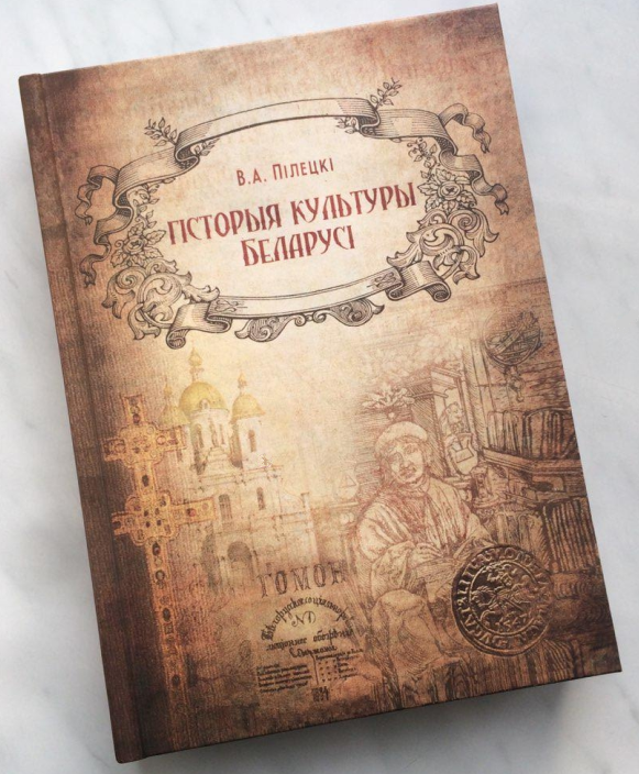 Новая книга 2019 года по истории культуры Беларуси